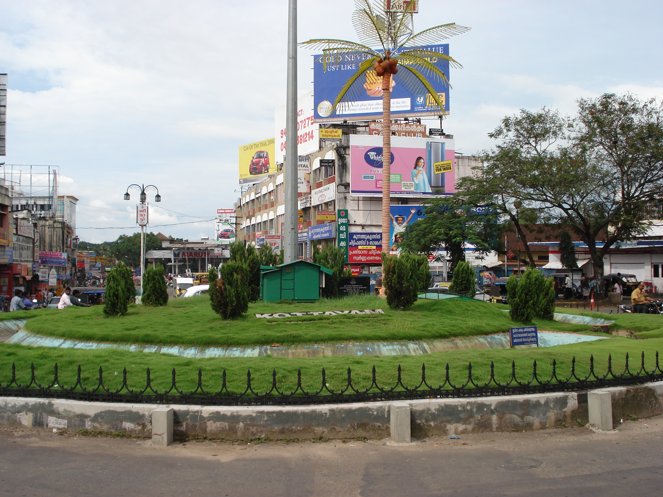 Seemaatti Junction, Kottayam